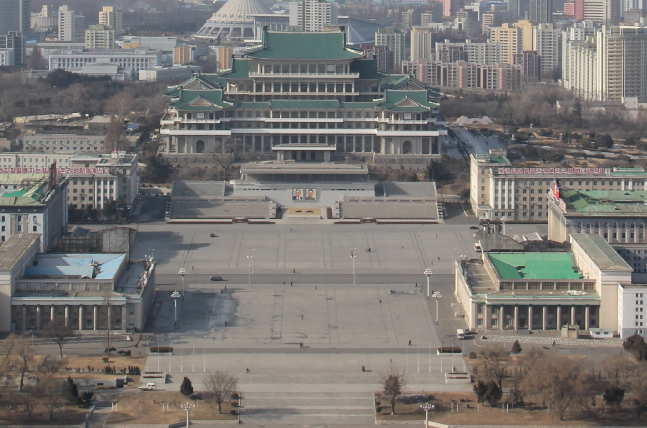 Juche Tower